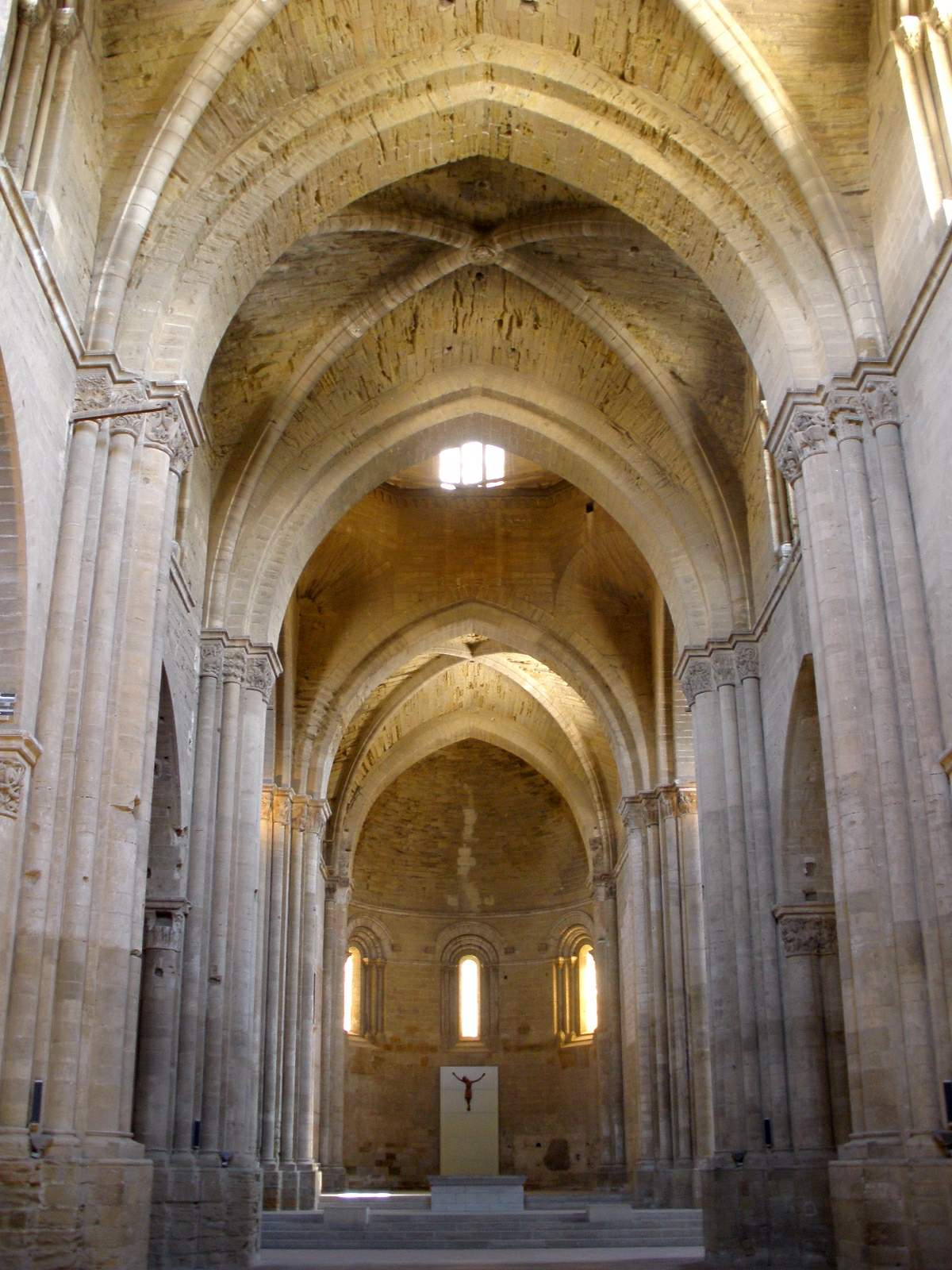 Catedral Vieja (Seu Vella) de Lleida.